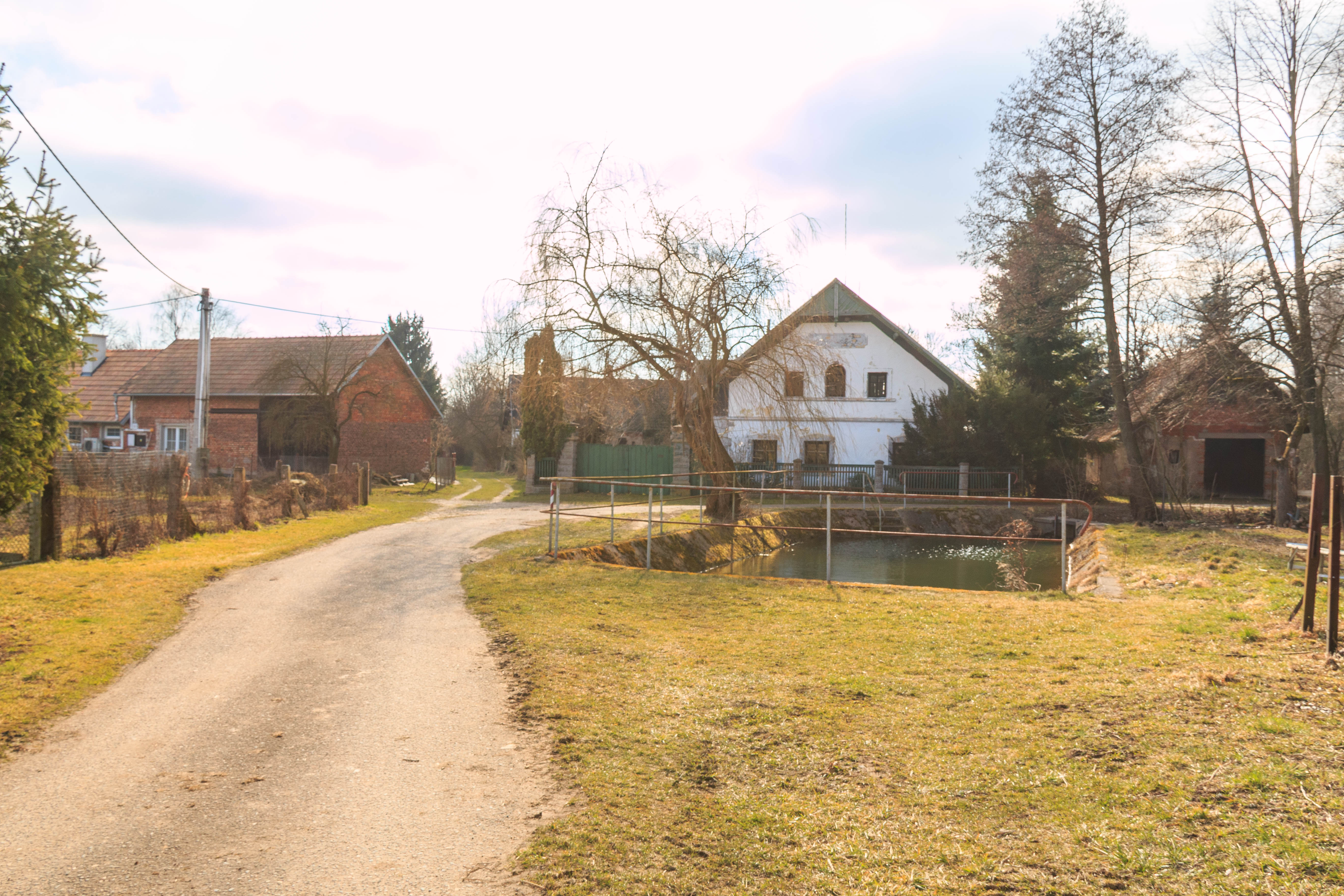 Veselice čp. 25